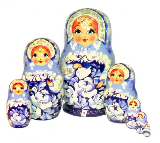 5 "Gzhel" poupées Russes